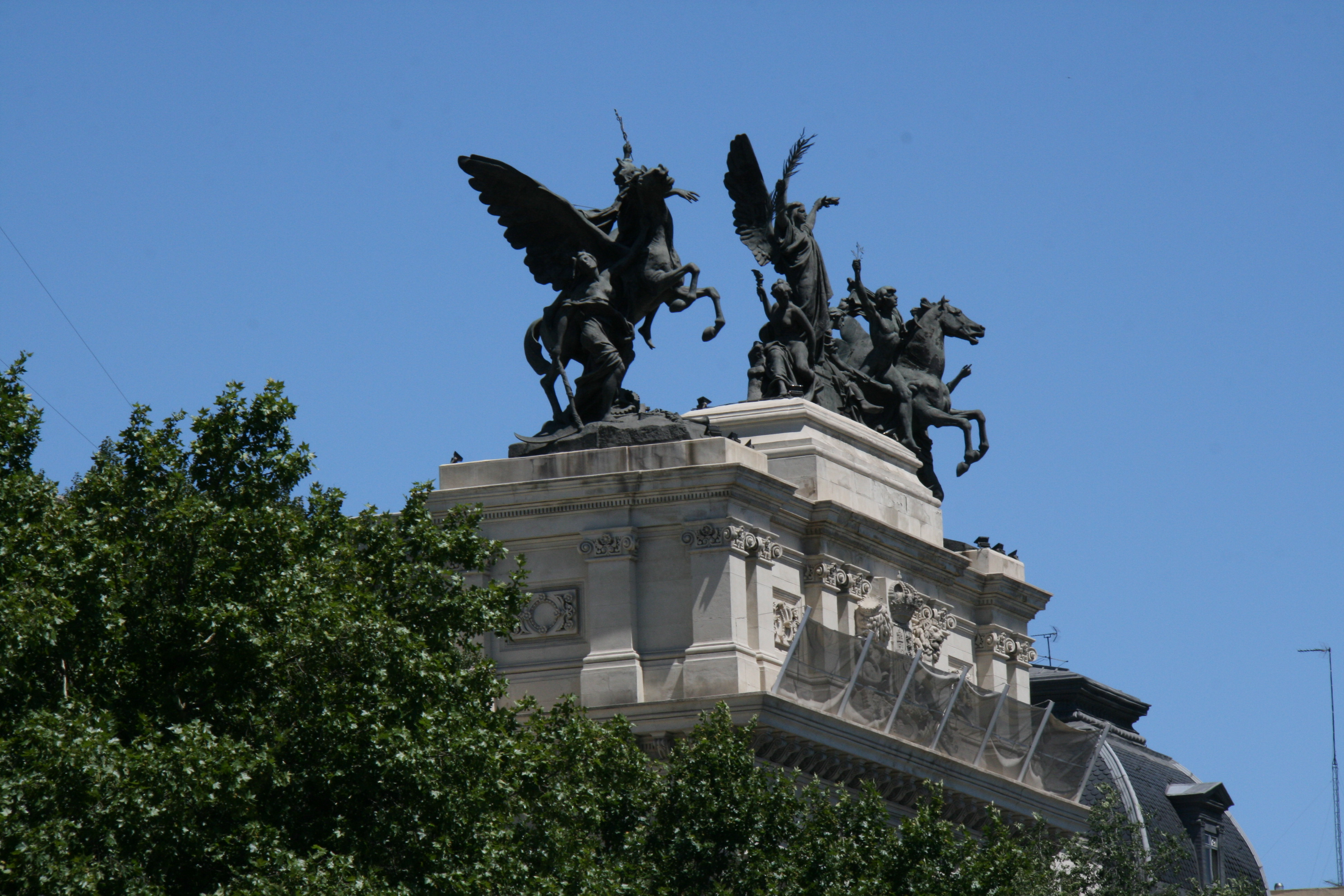 Caballos del Ministerio